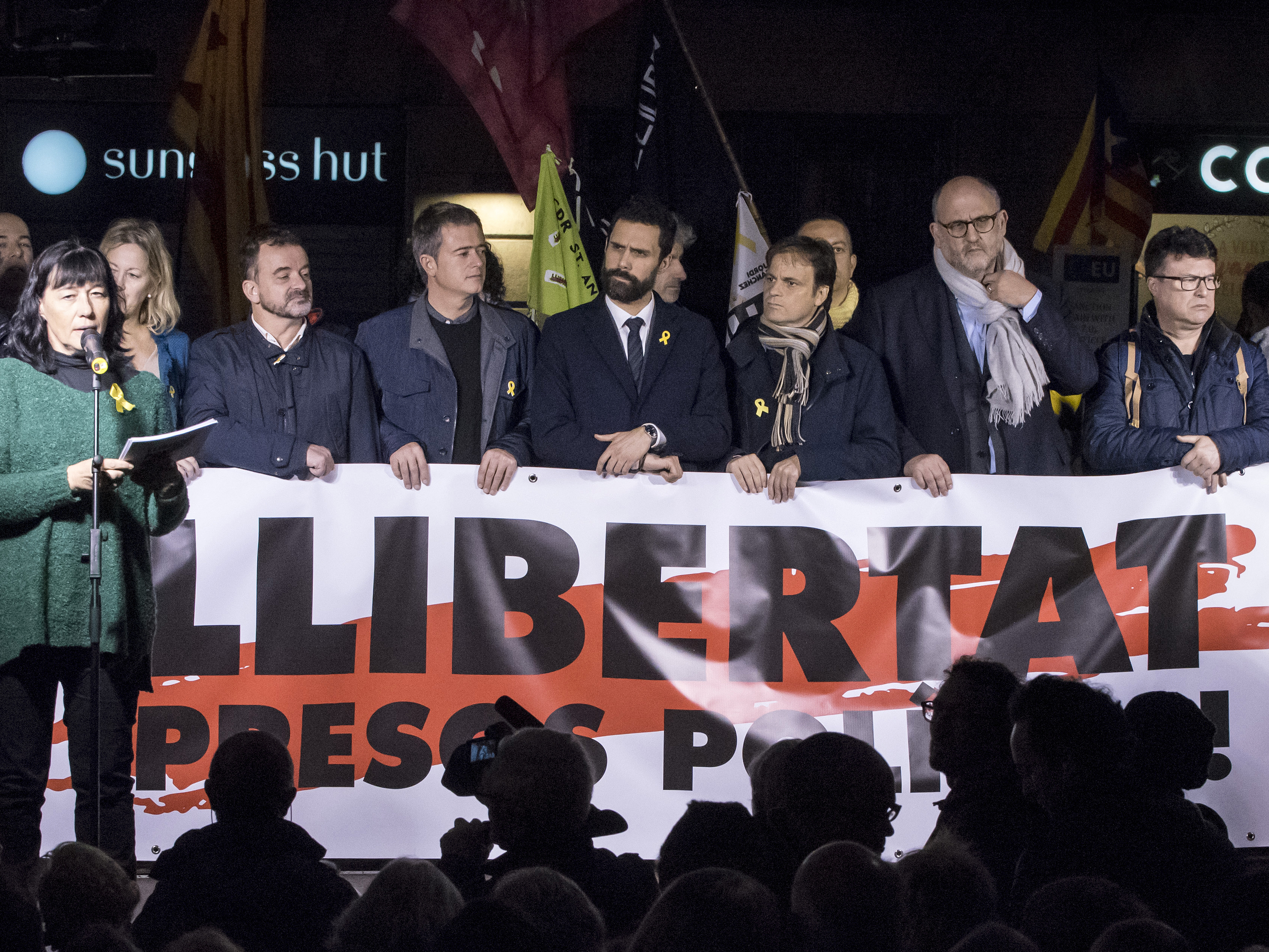 Roger Torrent, presidente del Parlamento de Cataluña, en un acto para pedir la libertad de los "presos políticos" Oriol Junqueras, Joaquim Forn, Jordi Sánchez y Jordi Cuixart. Aparece en el centro sosteniendo la pancarta Presos polítics. Llibertat.